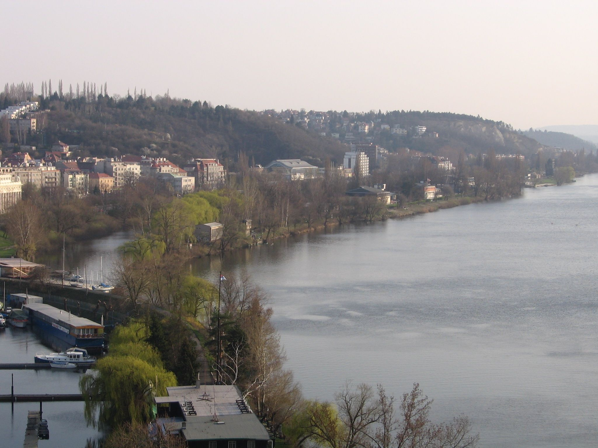 Veslařský ostrov z Vyšehradu